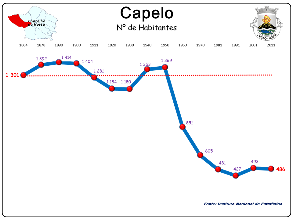 População